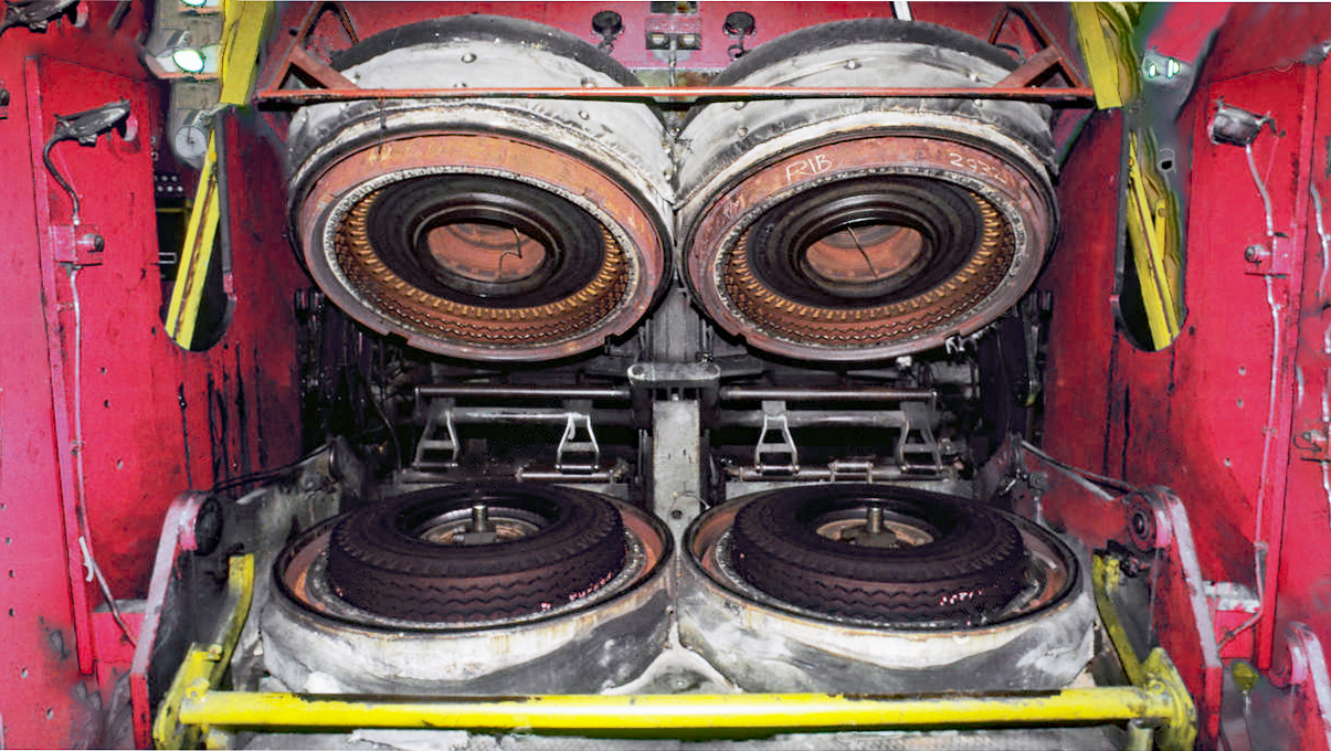 Mesin ini telah lama diguna dan bertujuan untuk membentuk tayar mengikut acuan